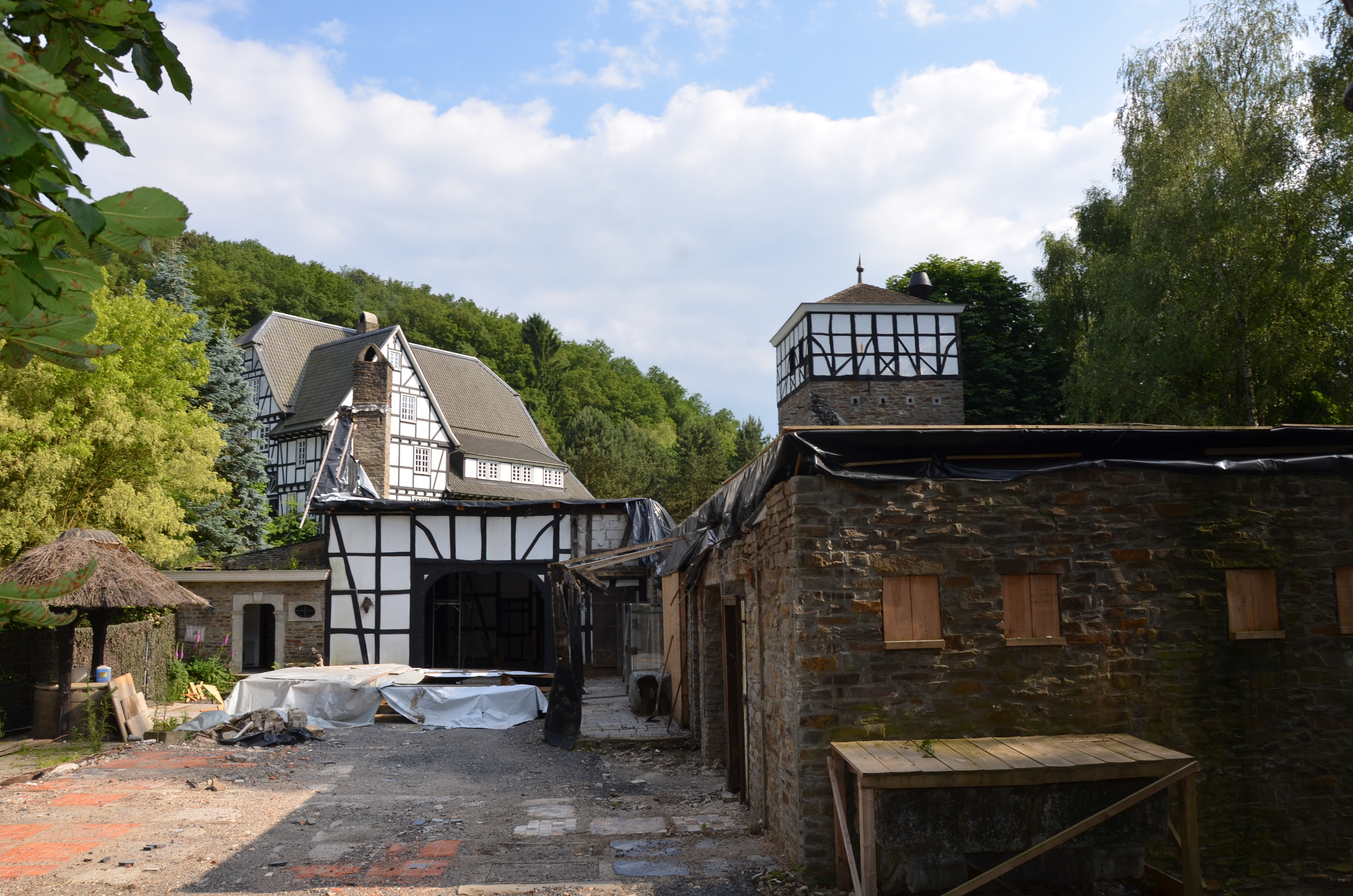 Gut Hungenbach, Kürten, Bergisches Land, Haus Hungenbach nach einem Brand im April 2013 The making of this document was supported by the Community-Budget of Wikimedia Germany.